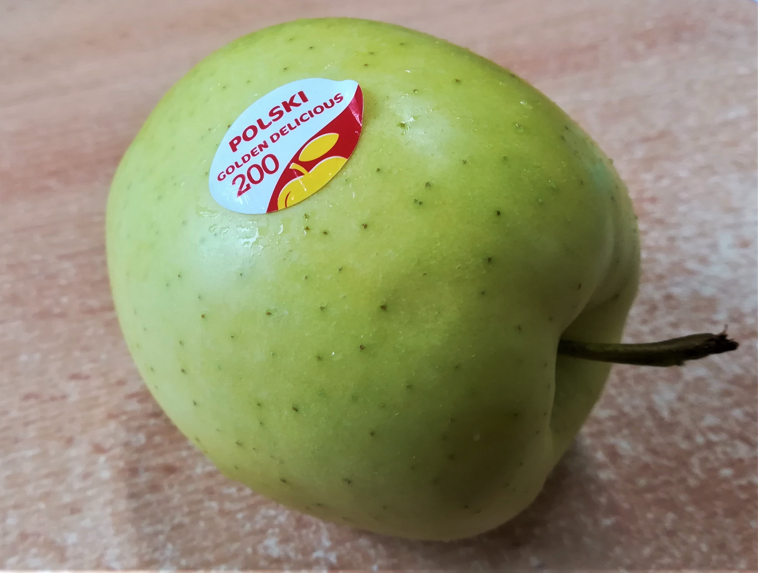 Polskie jabłko Golden Delicious.